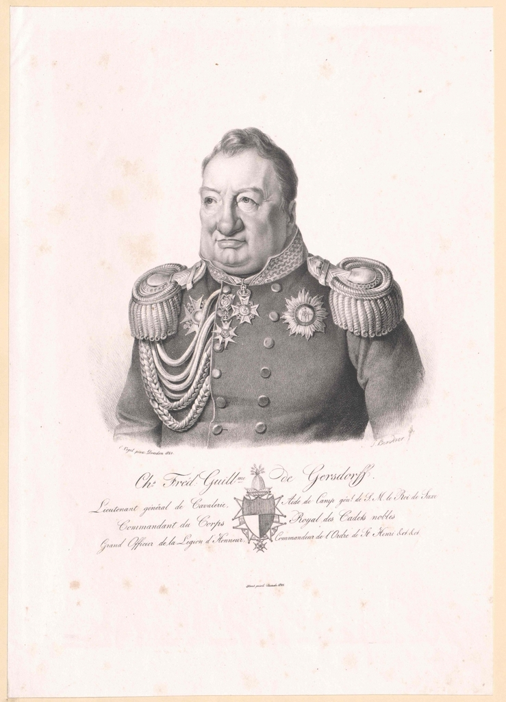 Saksisch generaal Karl Friedrich Wilhelm von Gersdorff